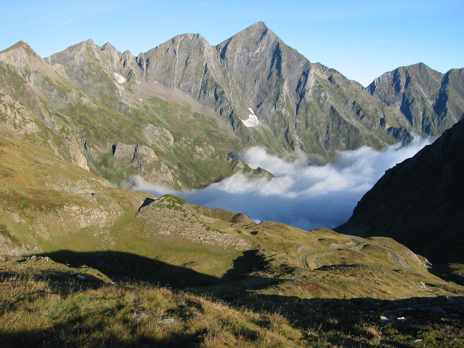 Mont Valier (vu de la route du Port d'Aula), Couserans, Ariège, Pyrénées, France.